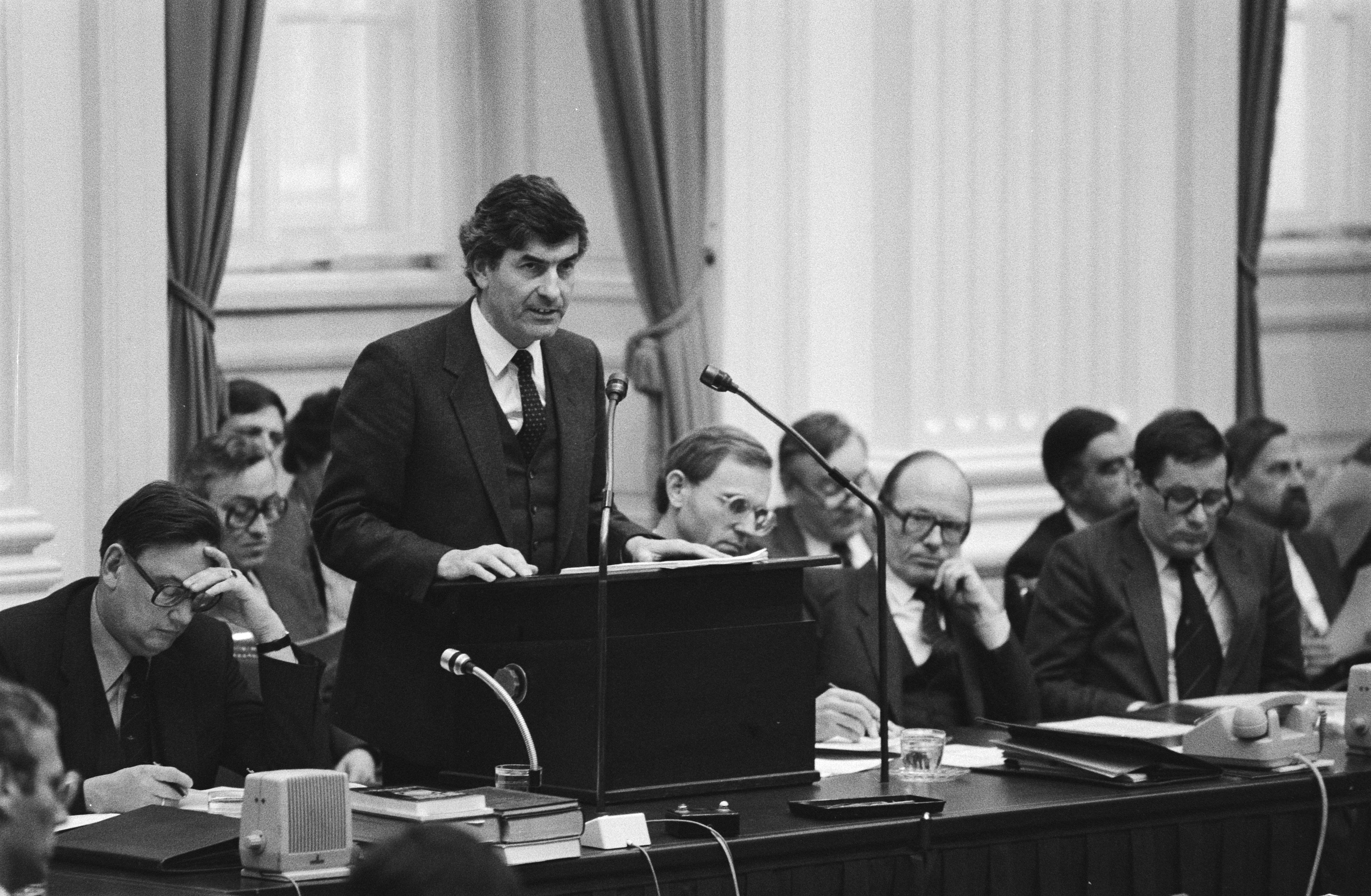 Collectie / Archief : Fotocollectie Anefo Reportage / Serie : Regeringsverklaring van het kabinet Lubbers Beschrijving : Premier Lubbers aan het woord Datum : 22 november 1982 Locatie : Den Haag, Zuid-Holland Trefwoorden : parlementariërs, politiek, regeringen, regeringsverklaringen Persoonsnaam : Lubbers, Ruud Fotograaf : Bogaerts, Rob / Anefo Auteursrechthebbende : Nationaal Archief Materiaalsoort : Negatief (zwart/wit) Nummer archiefinventaris : bekijk toegang 2.24.01.05 Bestanddeelnummer : 932-4103